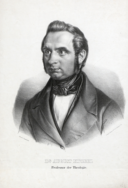 Unten links unter dem Portrait: Gez. von Trautschold; rechts: Druck Kramp & Cie in Offenbach a. M. Unter dem Bild: AUGUST KNOBEL / Professor der Theologie. Unten rechts am Bildrand: 1296 (alte Inventarnr.) Alte Signatur: Mappe 5 Kupferstiche Lithographien, Sachgruppe: P